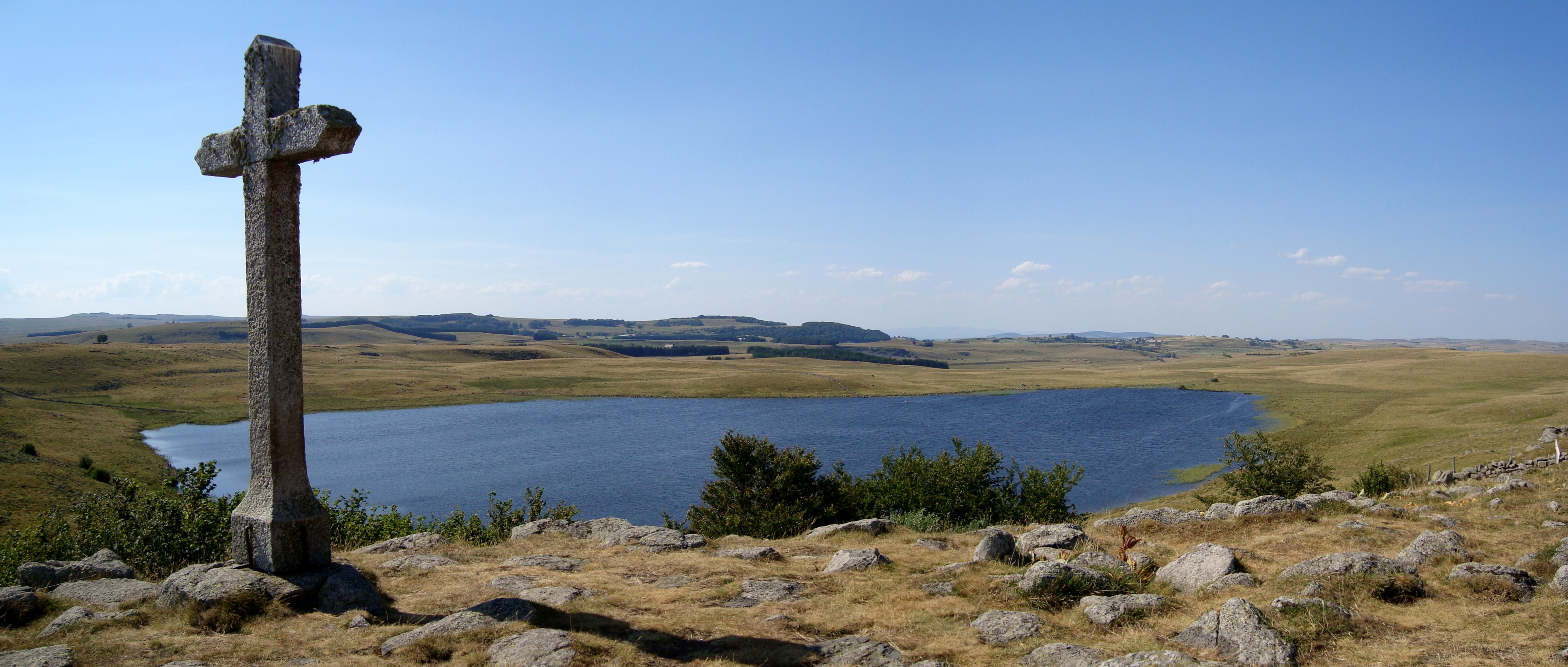 Le lac de Saint Andéol dans les monts d'Aubrac en Lozère (France).